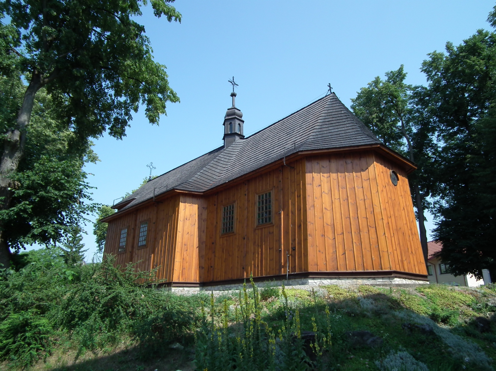 Annopol, ul. Kościuszki 2 - kościół parafialny p.w. śś. Joachima i Anny (drewn., XVIII w.)Cmentarz kościelnyzabytek nr A/99 z 30.11.1966 i z 24.02.1977